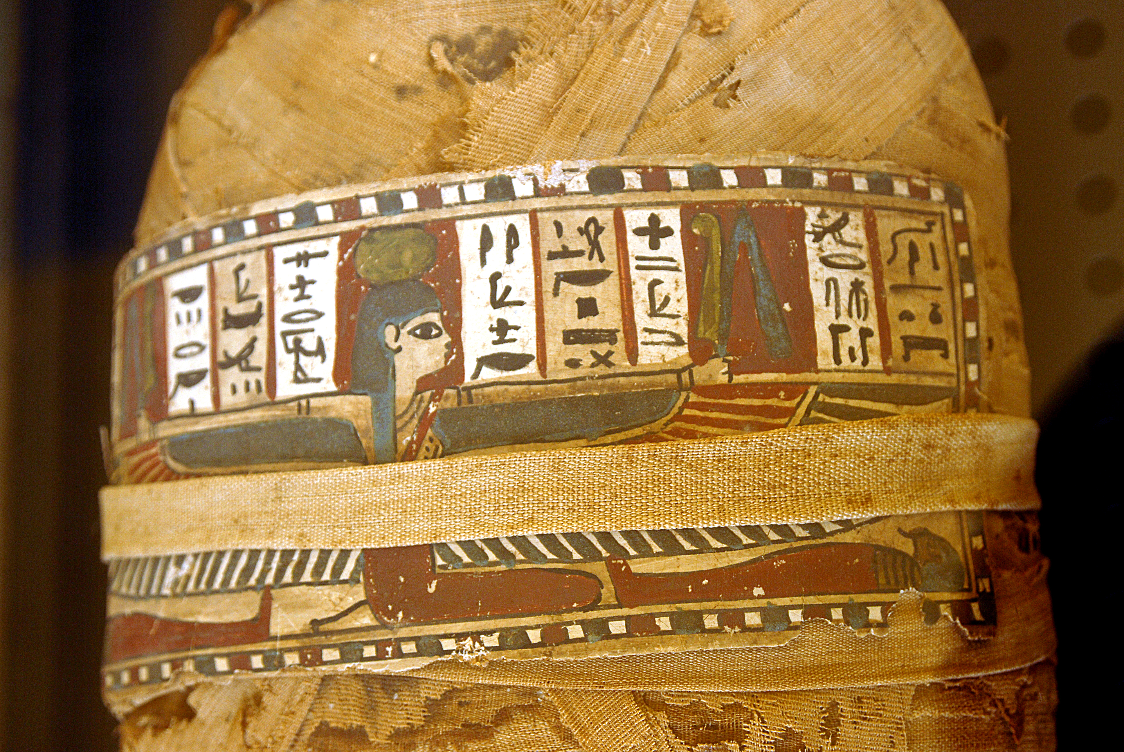 Plantilla superior de la mòmia. Inscripció: "Paraules de la deessa Nut: Estic aquí per a protegir-te i m'estenc sobre teu rebutjant tots els mals".